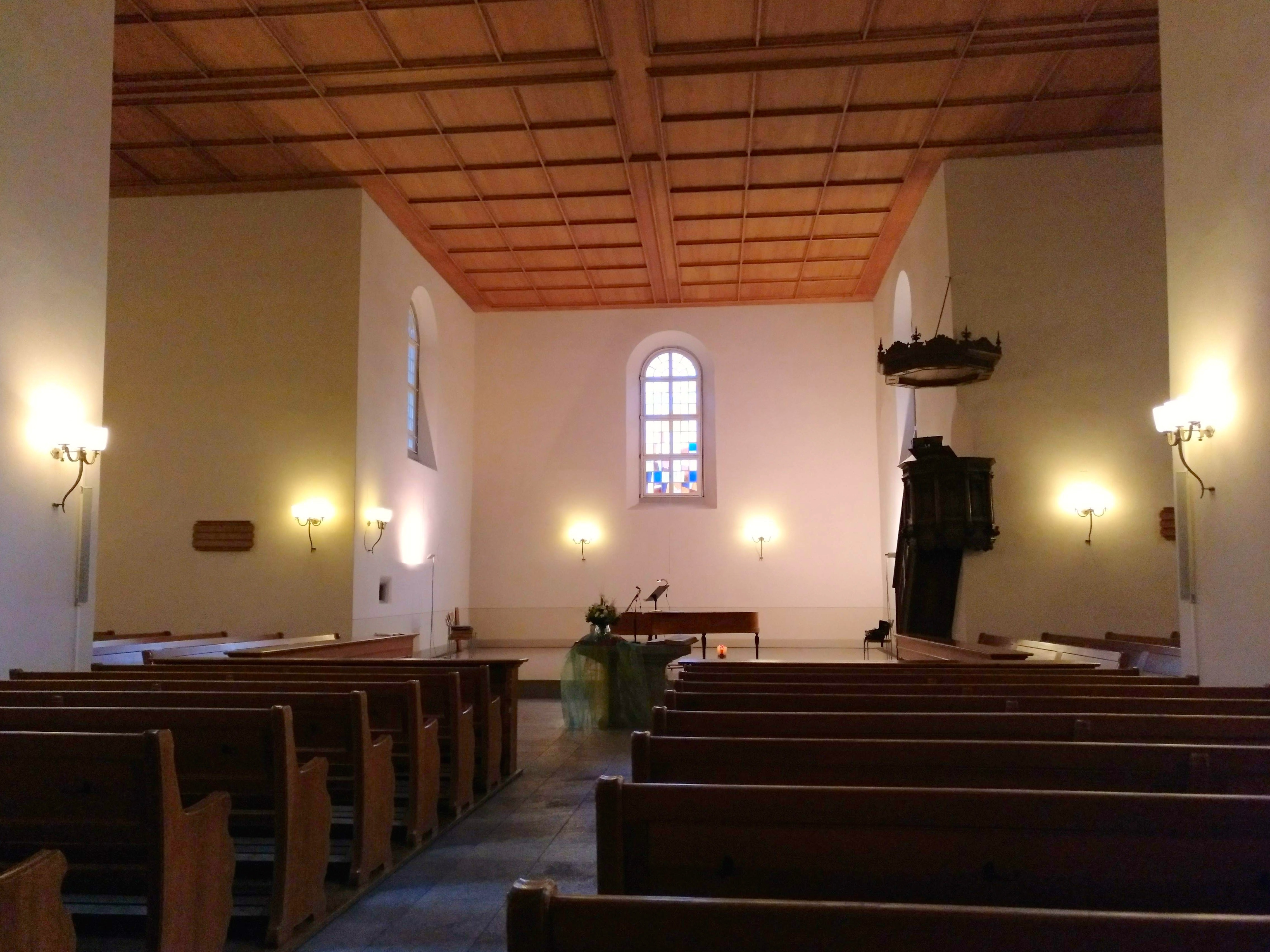 Schiff und Chorraum der Kirche St. Mangen in St. Gallen